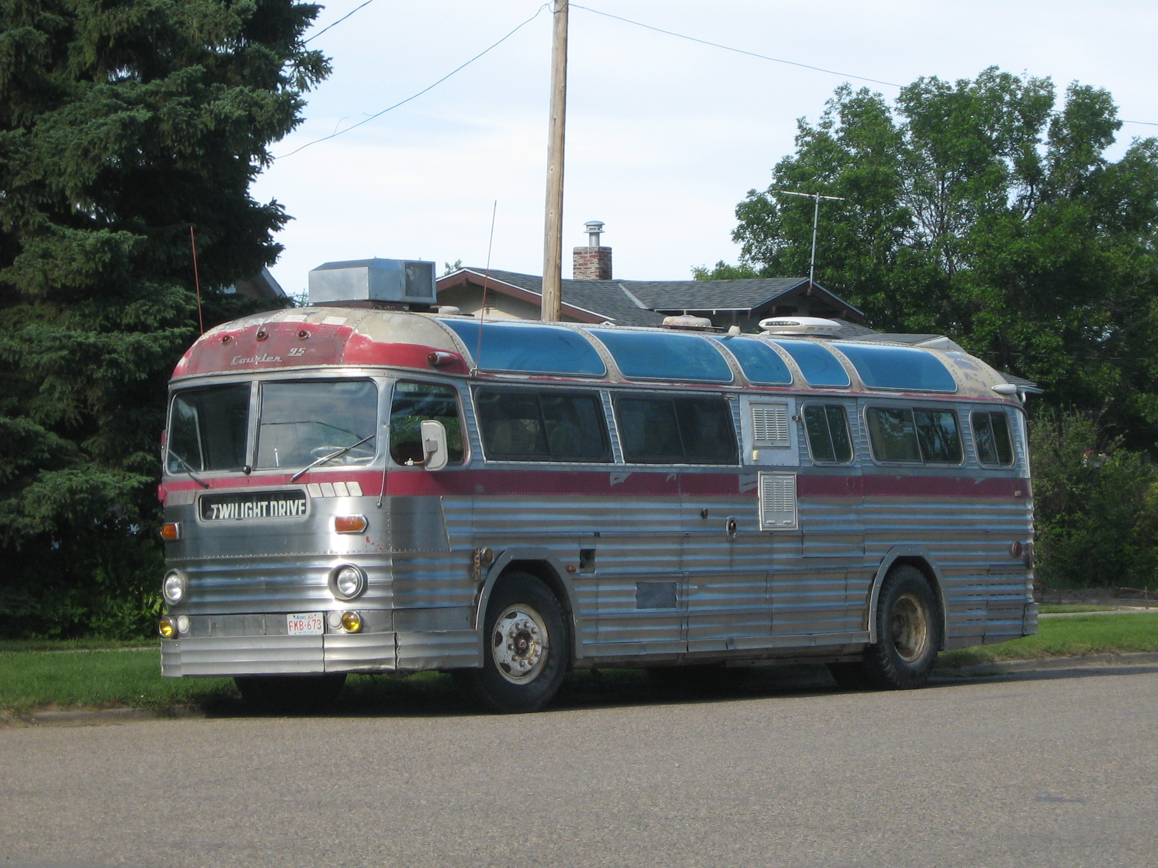 Old Bus